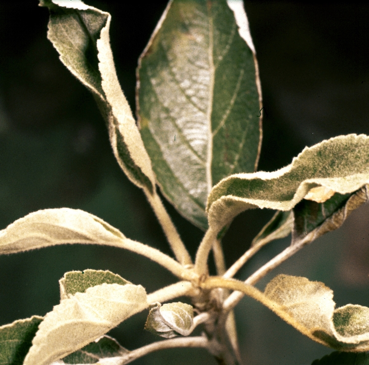 Podosphaera leucotricha (Ellis & Everh.) E. S. Salmon, symptômes sur feuilles de pommier (Malus domestica).